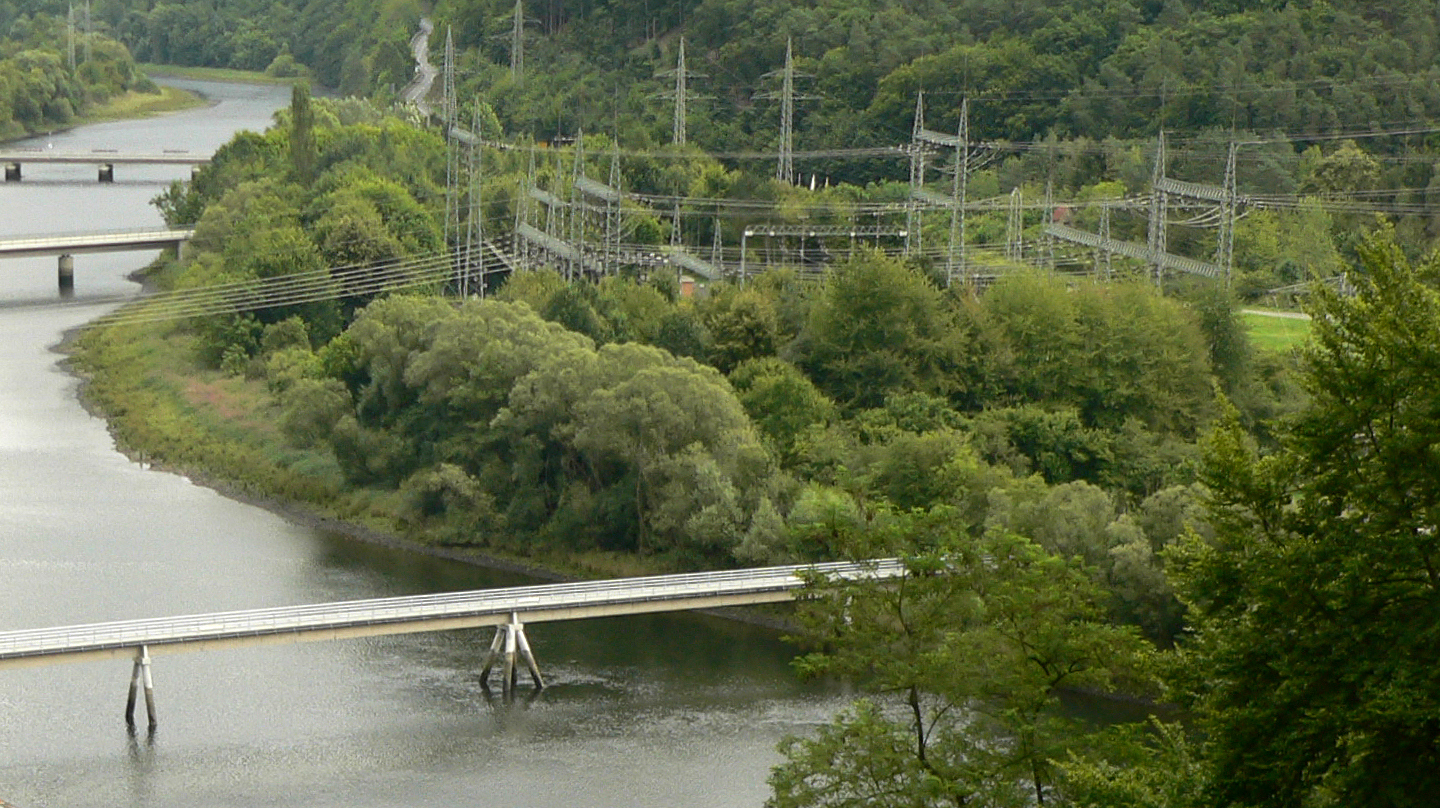 Freiluftschaltanlage des Pumpspeicherkraftwerk Waldeck